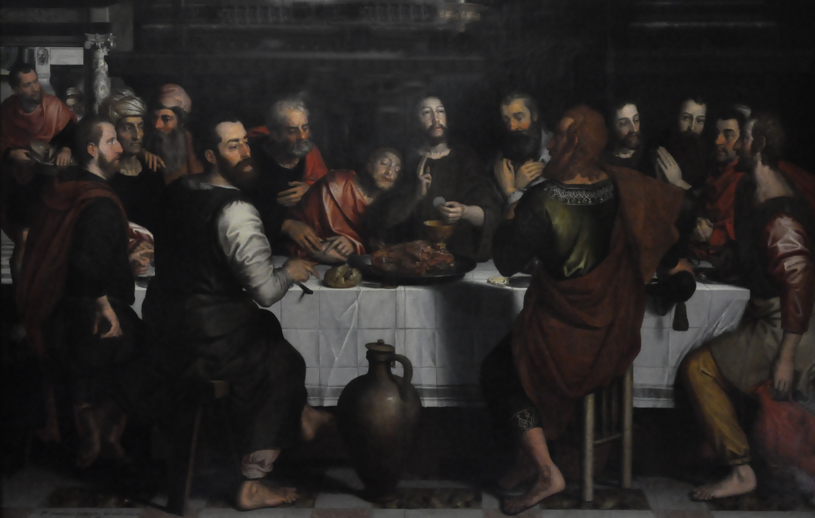 Pieter Pourbus - Het laatste avondmaal - OLVrouwekerk te Brugge